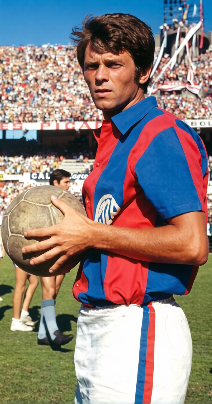 Doval en el Monumental